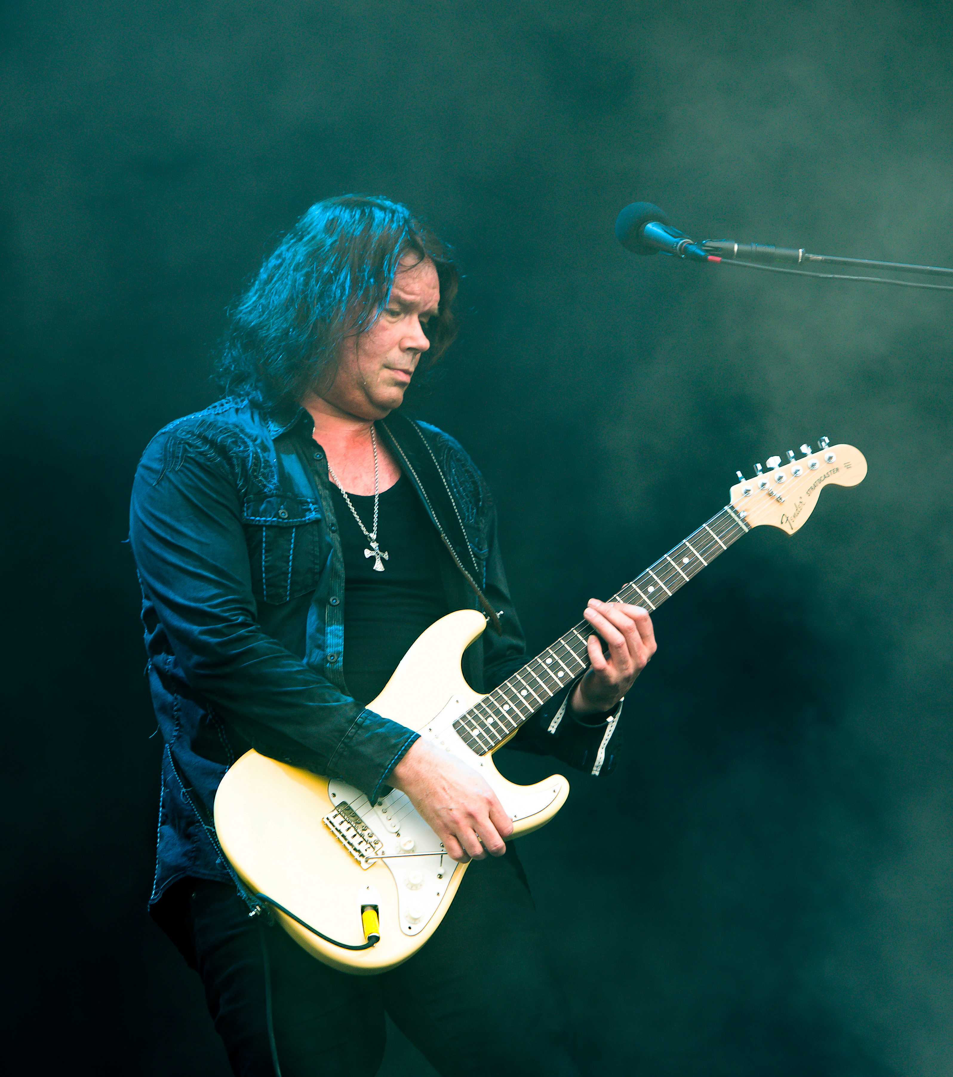 Europe beim Wacken Open Air 2017